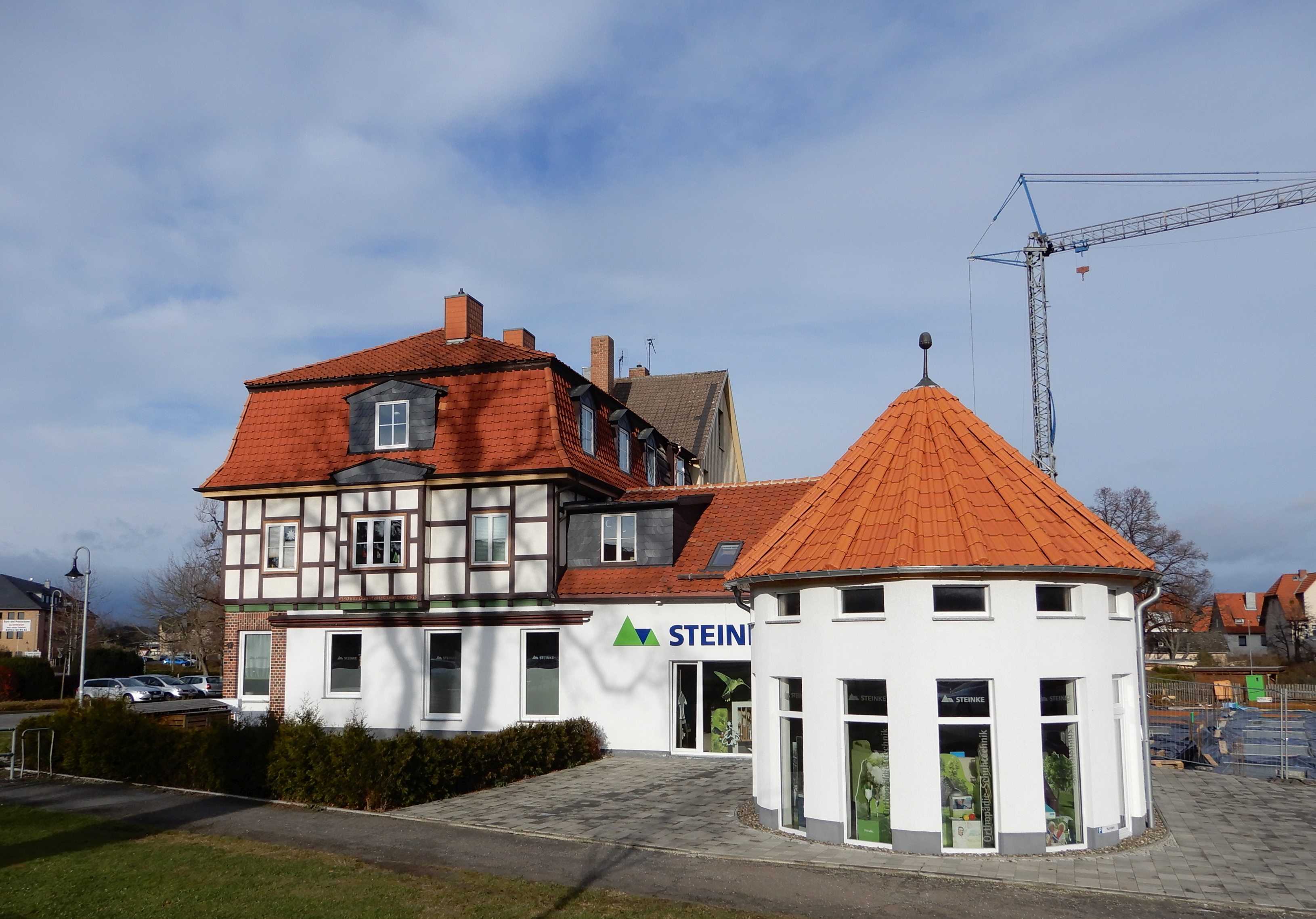 ehemalige Tankstelle, vom Ölberg aus gesehen